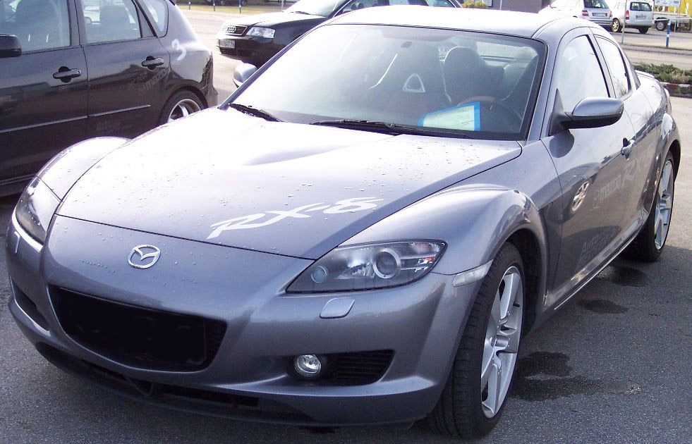 Mazda RX-8